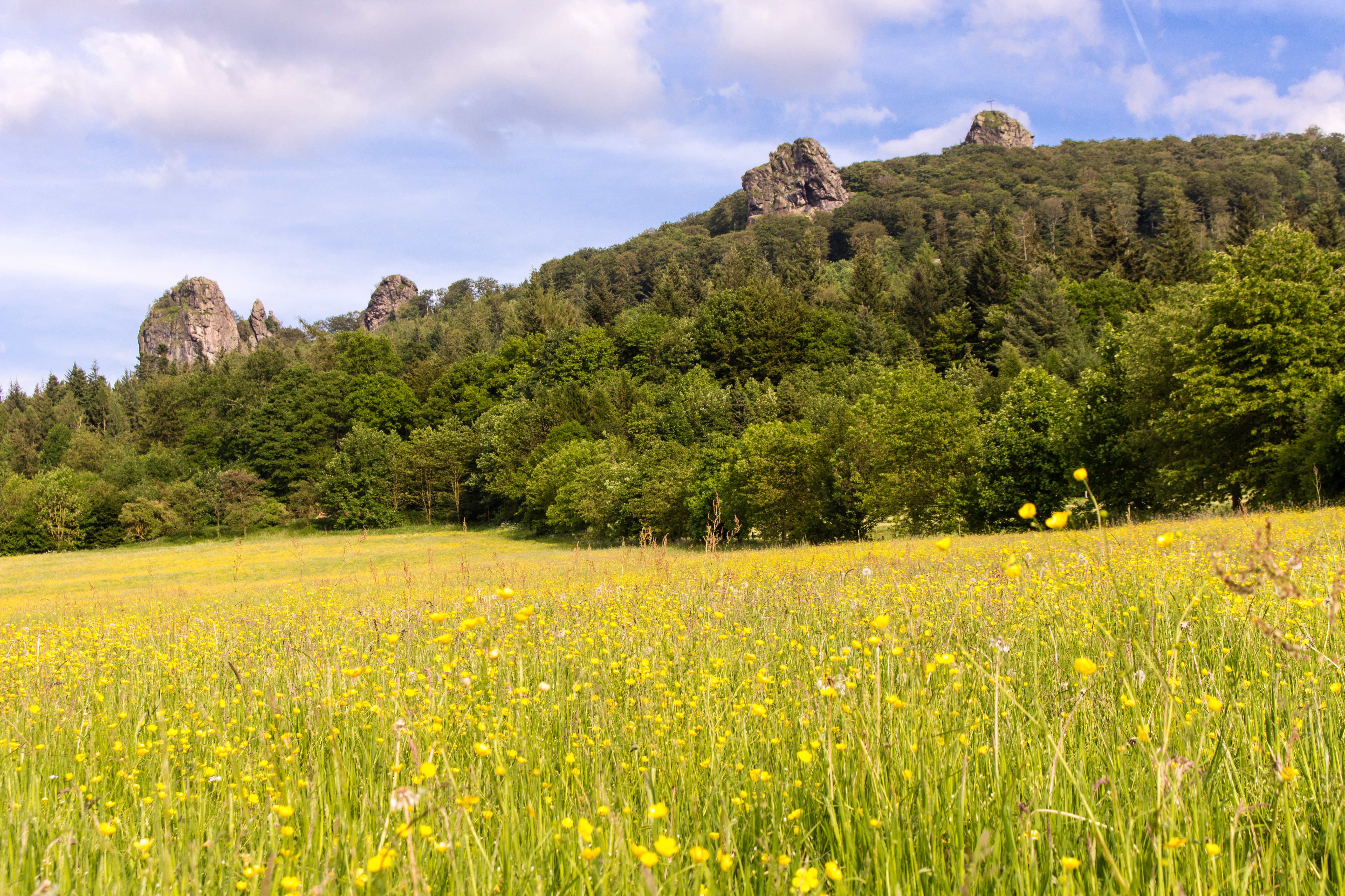 Blick zu den Bruchhauser Steinen, Olsberg, Hochsauerlandkreis, Nordrhein-Westfalen